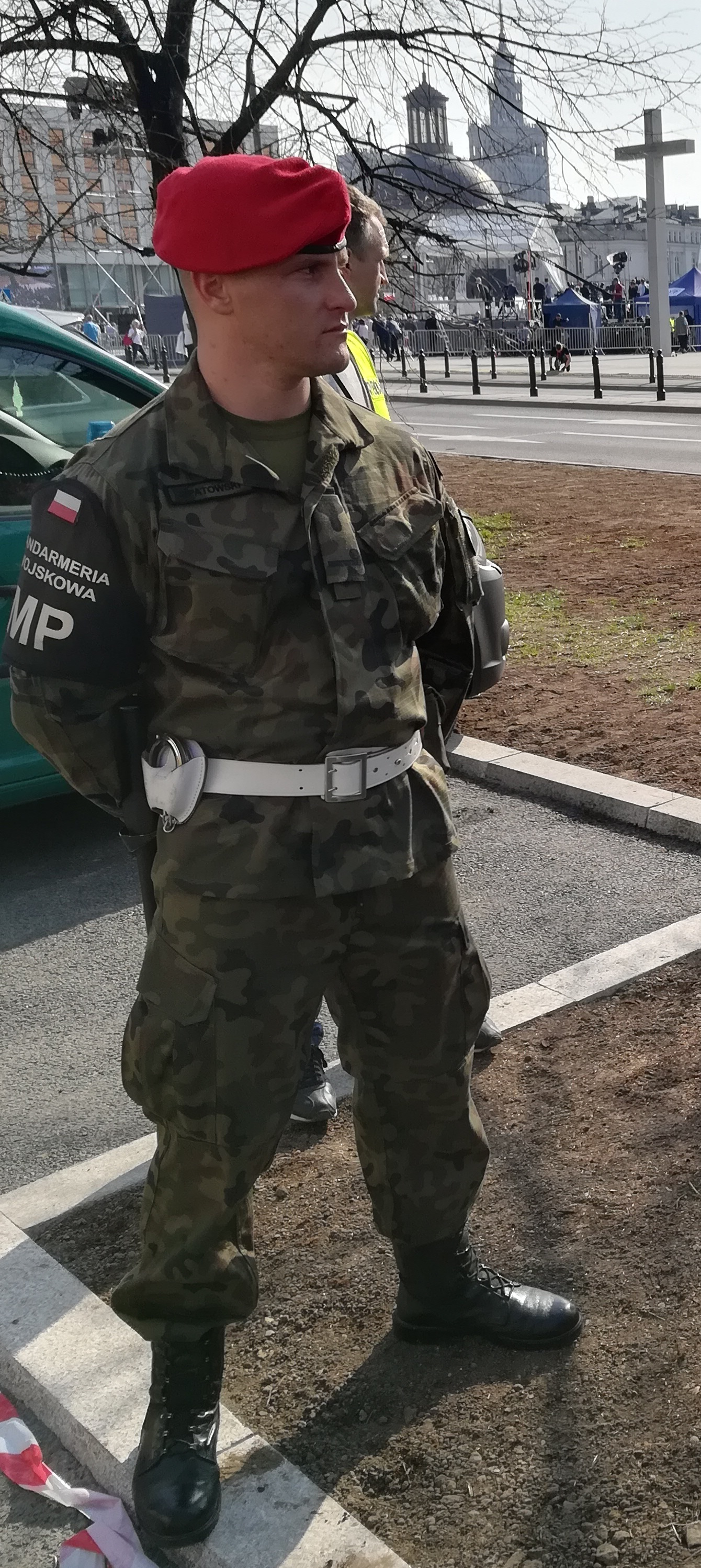 Żołnierz Żandarmerii Wojskowej zabezpieczający uroczystości odsłonięcia Pomnika Smoleńskiego w dniu 10 kwietnia 2018. W tle Plac Piłsudskiego.